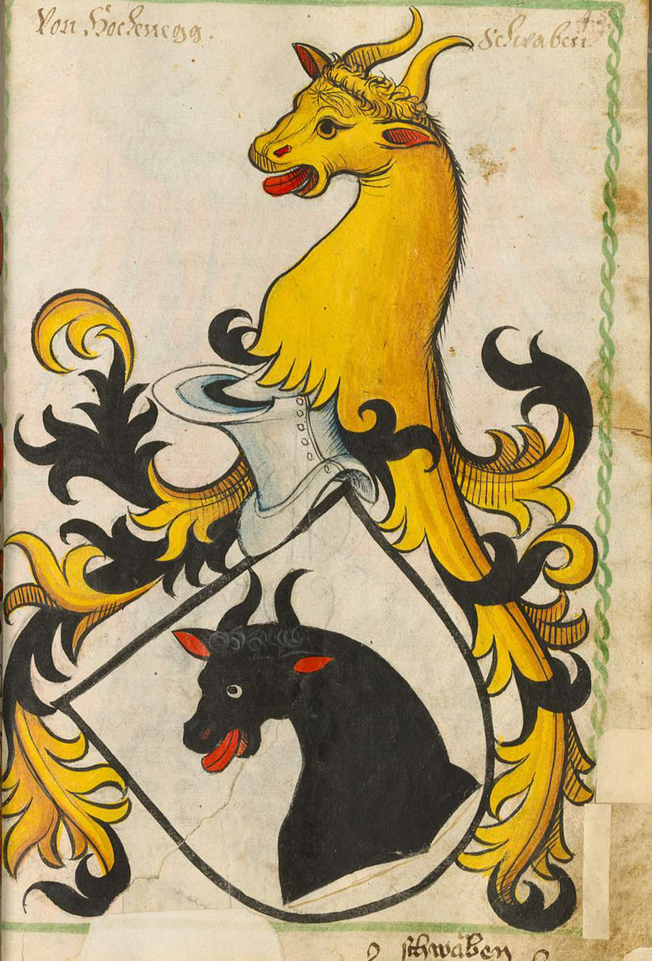 Scheibler'sches Wappenbuch, älterer Teil Hohenegg